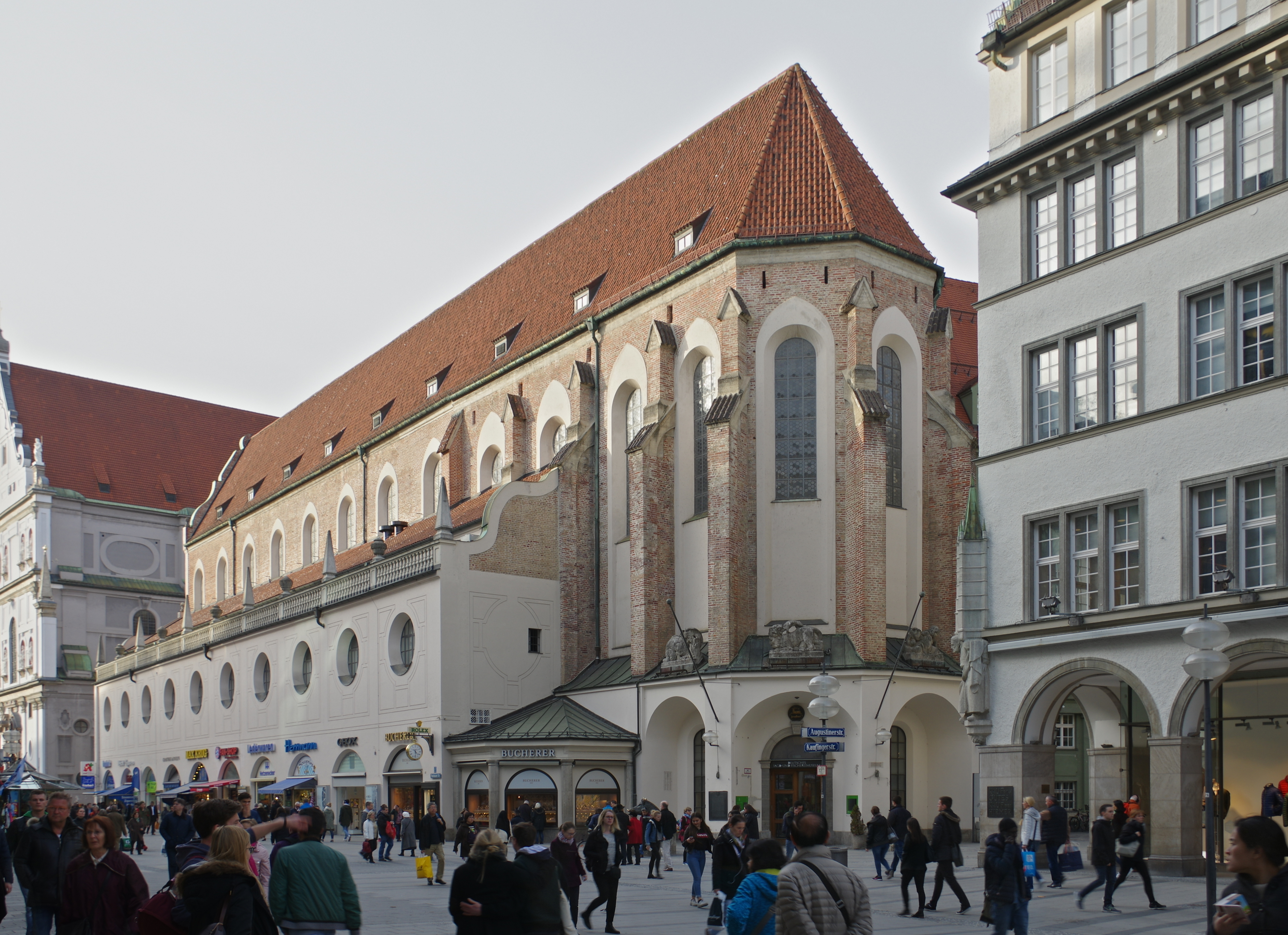 München, Neuhauser Straße 2, Augustinerkirche; Akten-Nr.D-1-62-000-4719